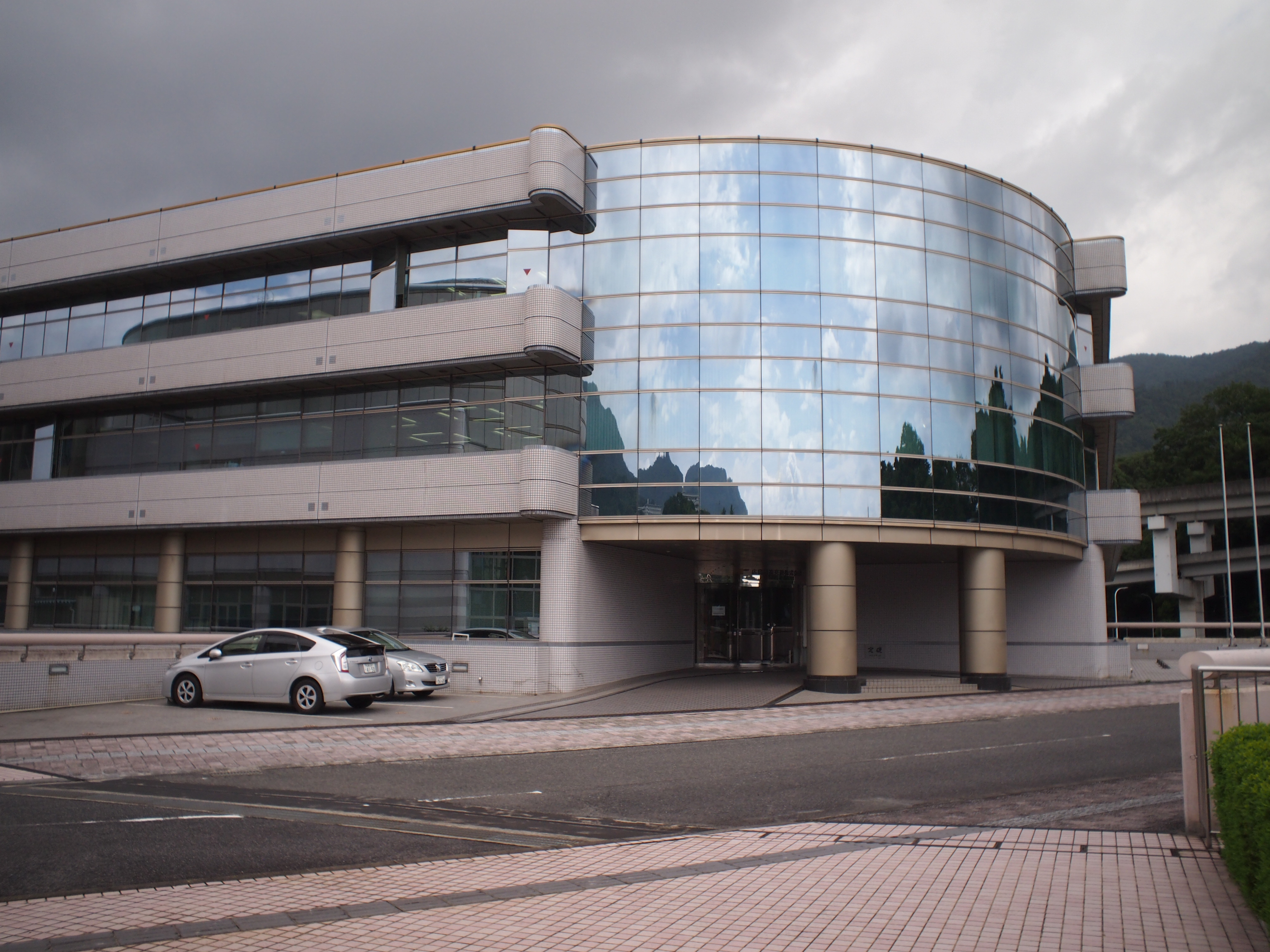 広島高速交通本社